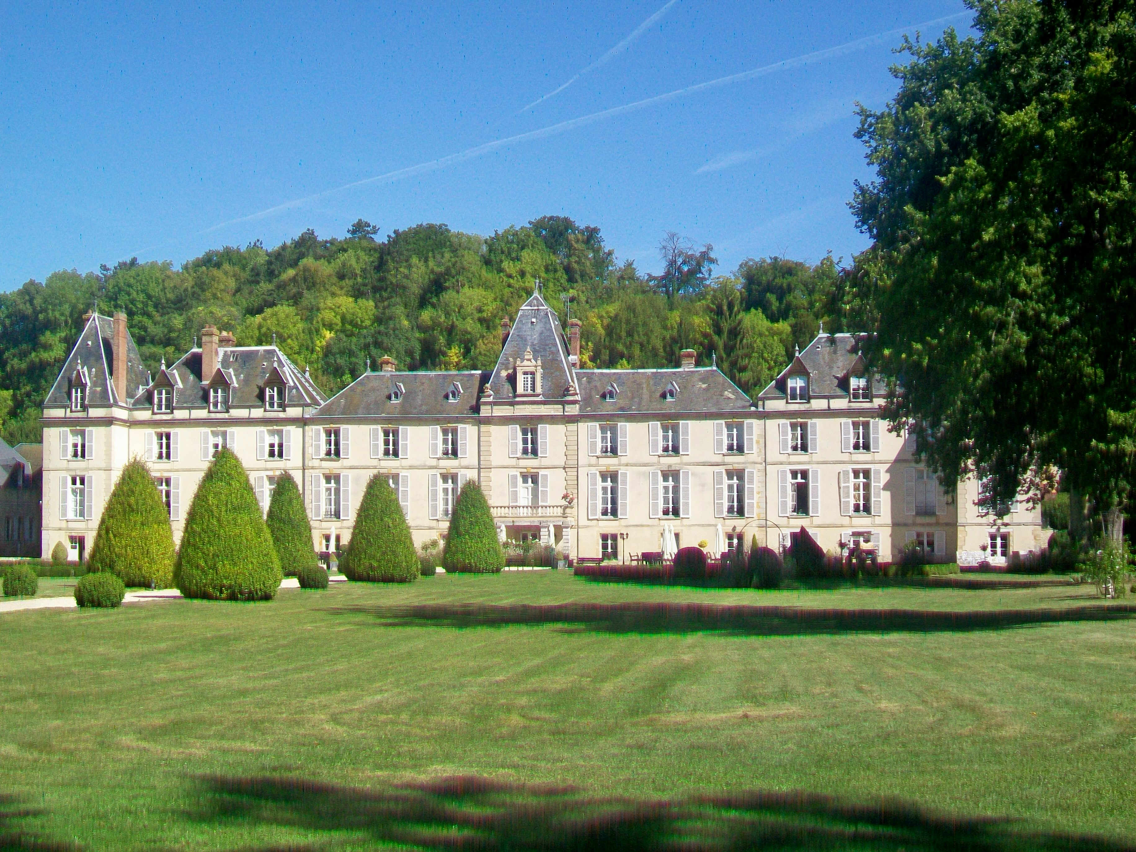 Le château d'Aveny au hameau du même nom, façade sud.